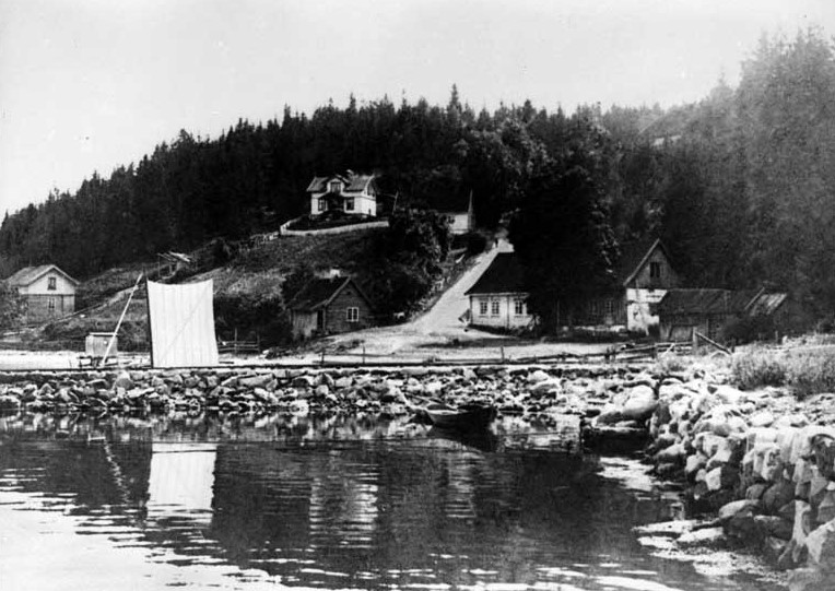 Fergestad ved Slottet i Hurum fotografert i 1900